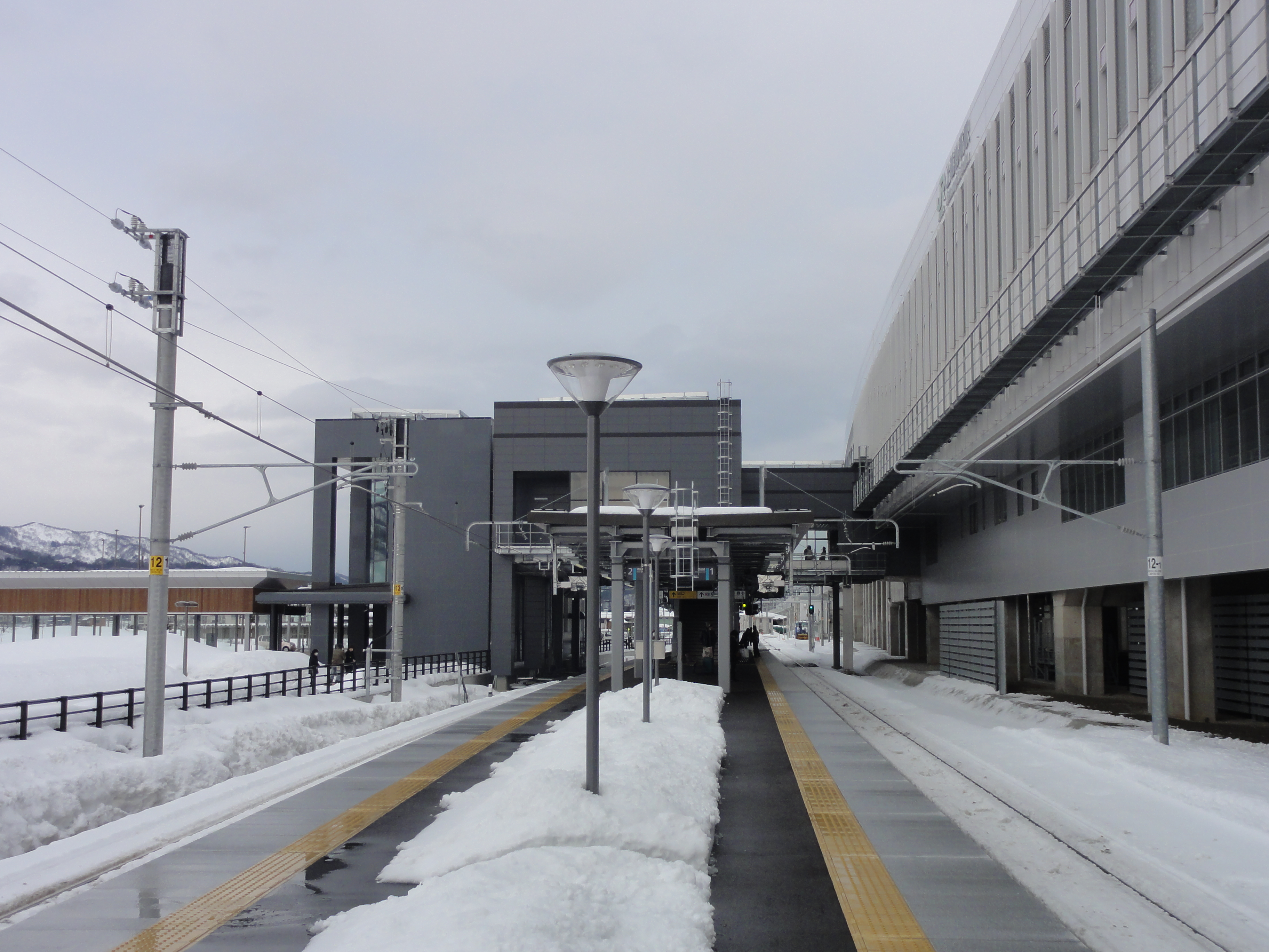 信越本線・脇野田駅ホーム （※2015年3月14日からはえちごトキめき鉄道上越妙高駅ホームとなる）